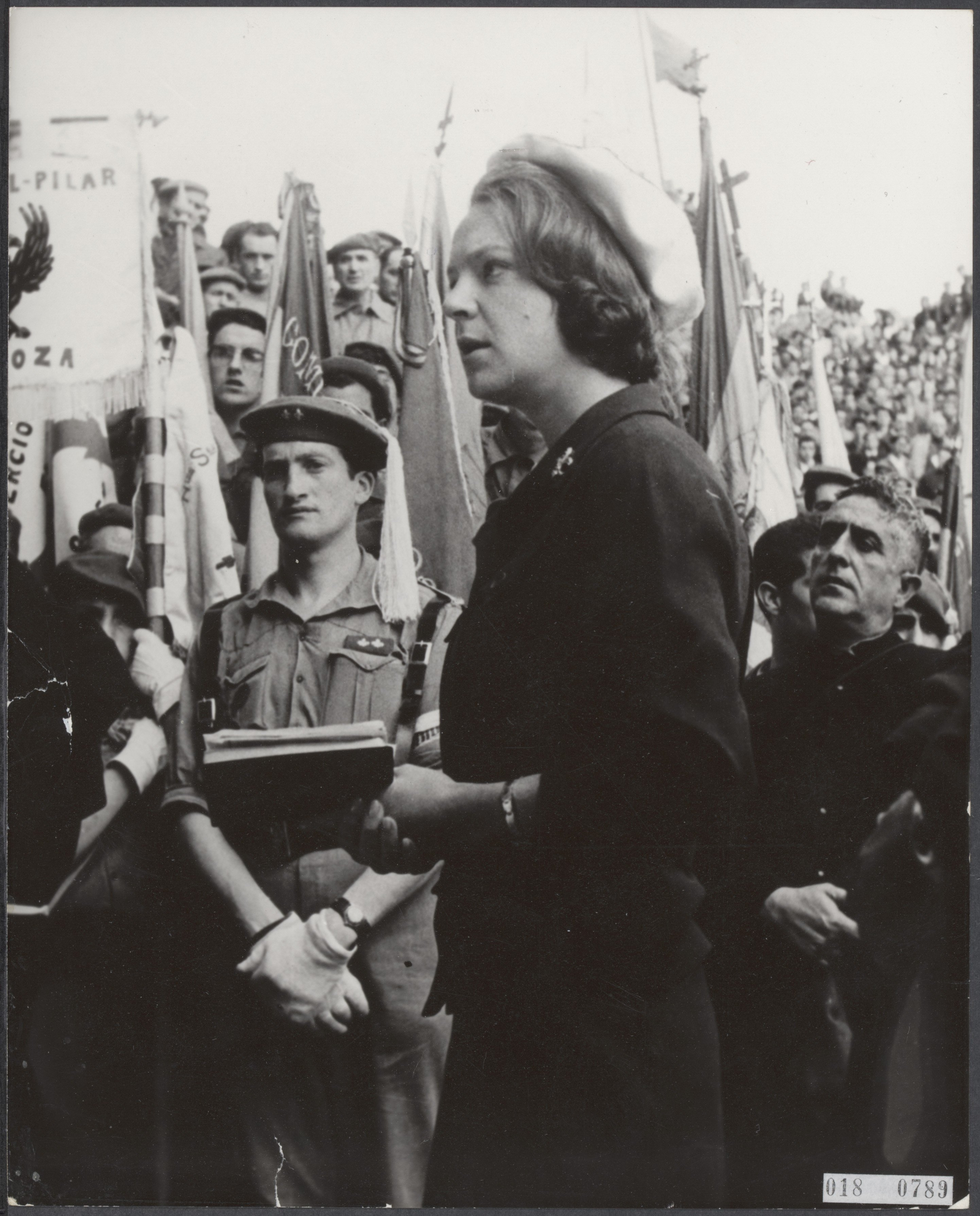 Collectie / Archief : Fotocollectie Elsevier Reportage / Serie : [ onbekend ] Beschrijving : Prinses Irene woonde zondag j.l. de jaarlijkse Carlistenbijeenkomst op de berg Montejurra bij, zonder prins Carlos Hugo. De prinses was getooid met de witte baret, zoals de vrouwelijke carlisten, die in het verleden droegen. De mannen dragen een rode baret. De prinses droeg ook zwarte laarzen. Prinses Irene bad voor de gevallen carlisten Datum : 4 mei 1965 Locatie : Montejurra, Spanje Trefwoorden : bijeenkomsten, koninklijk huis Persoonsnaam : Carlisten, Irene, prinses Fotograaf : [onbekend] Auteursrechthebbende : Nationaal Archief Materiaalsoort : Foto (zwart/wit) Nummer archiefinventaris : bekijk toegang 2.24.05.02 Bestanddeelnummer : 018-0789